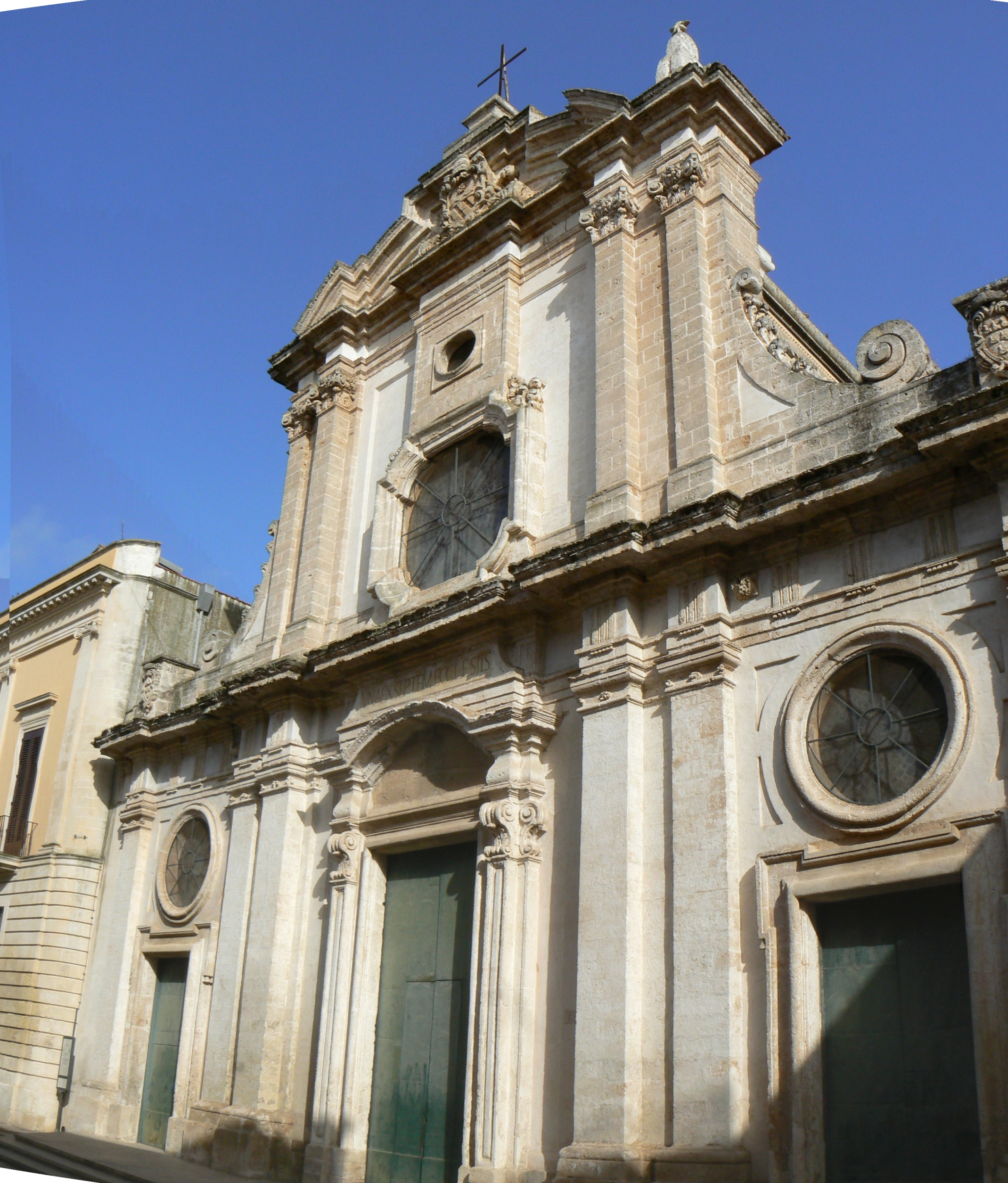 Chiesa Madre